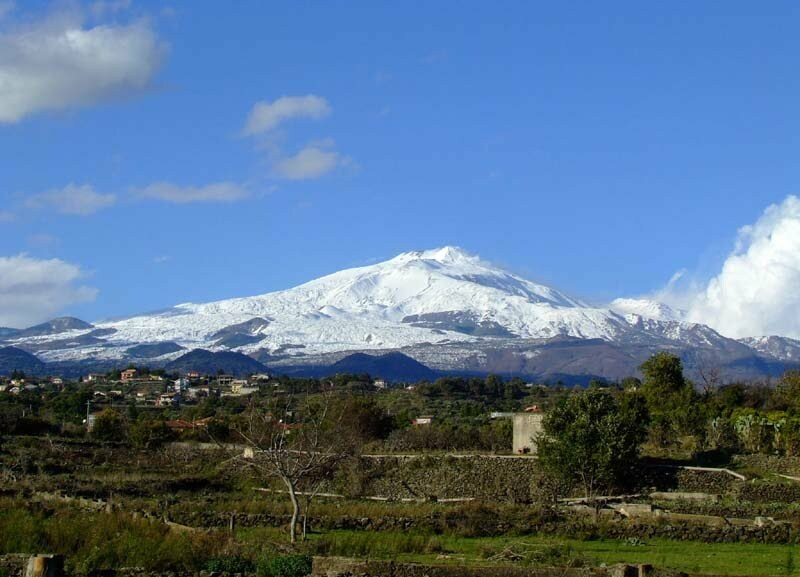 L'etna innevata vista da Tremestieri Etneo.